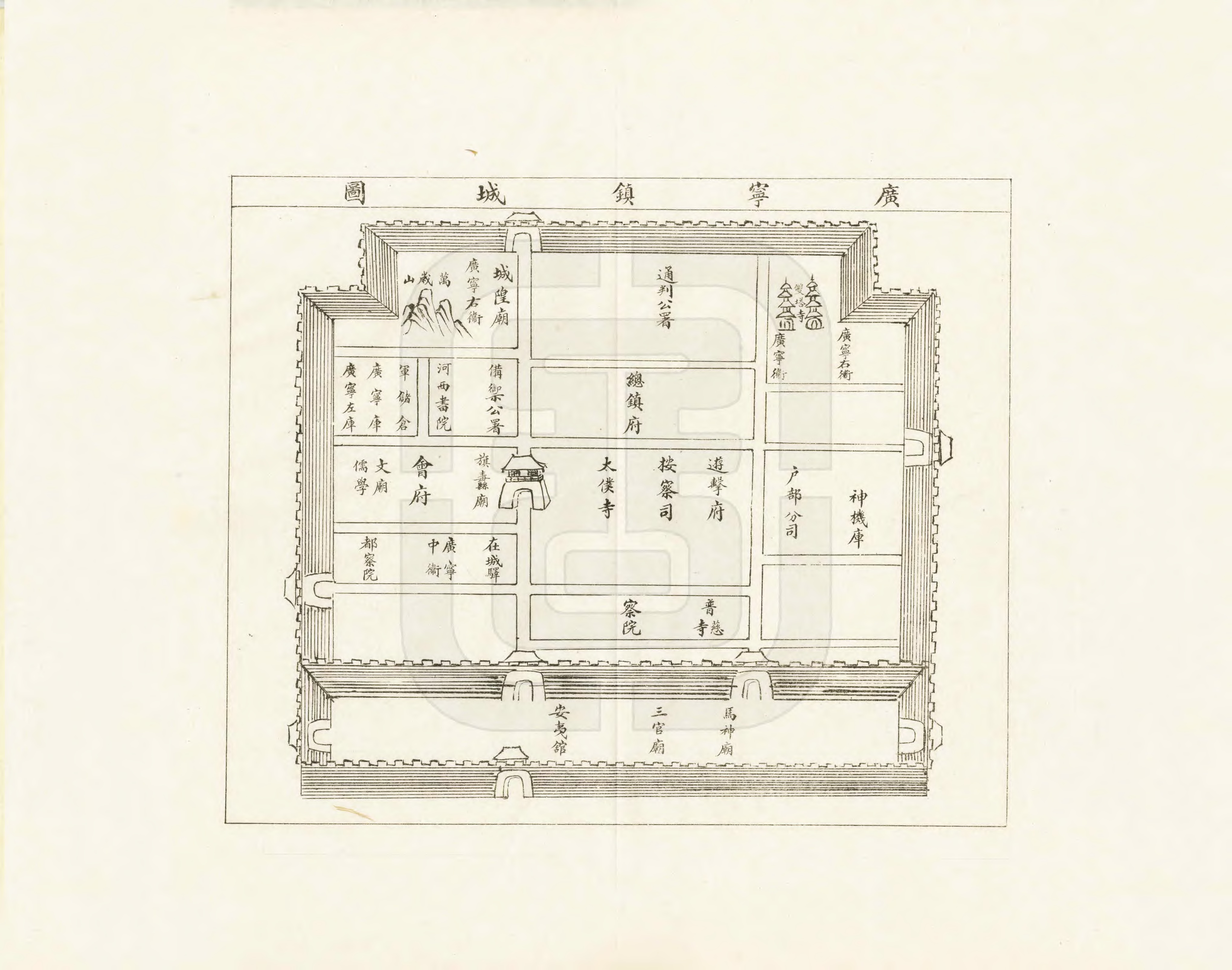 明嘉靖四十五年（1566）《全辽志》广宁镇城图，此版本为民国二十三年（1934）重刊。